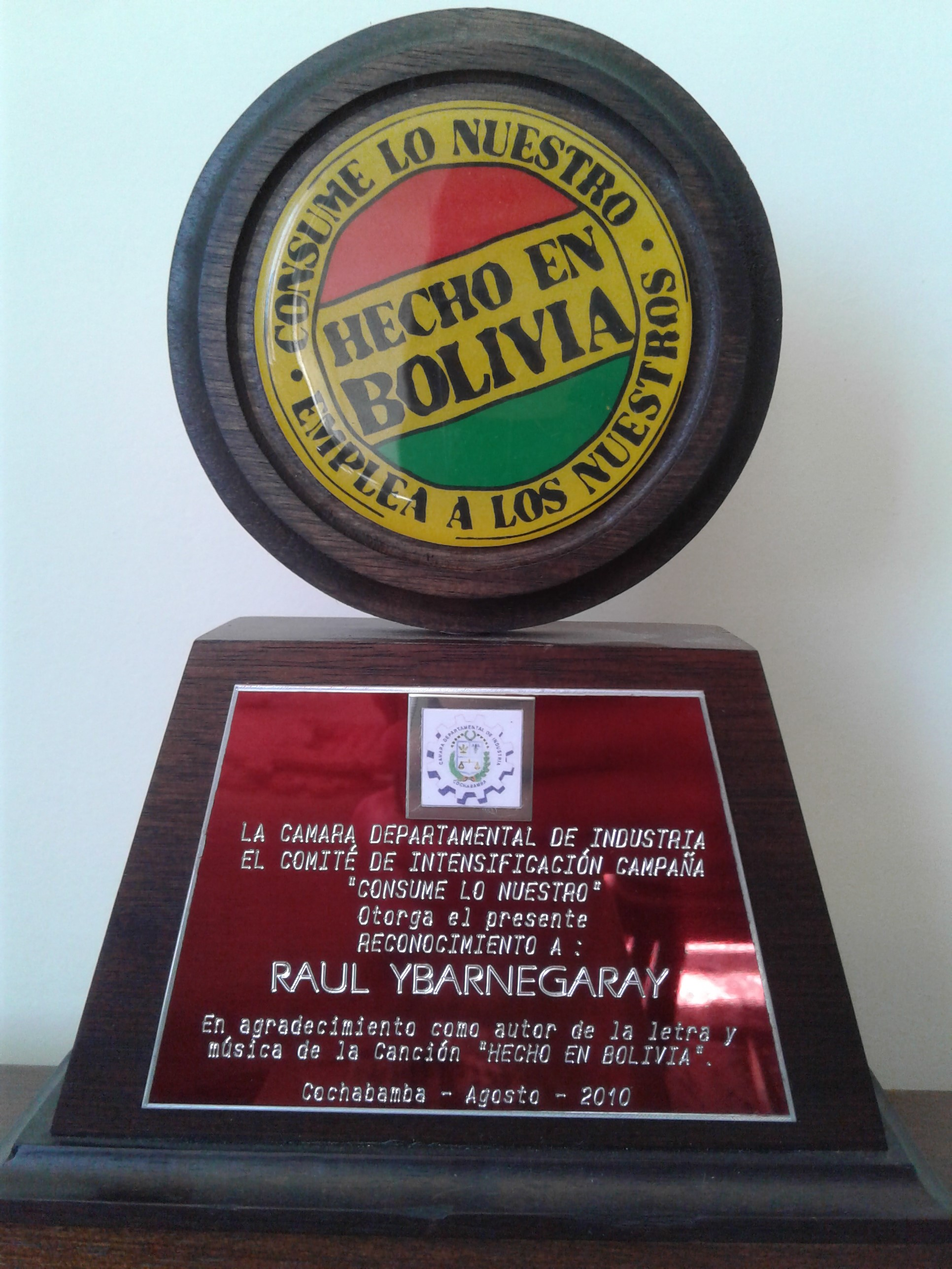 Raúl Ybarnegaray - Reconocimiento Hecho en Bolivia 2010